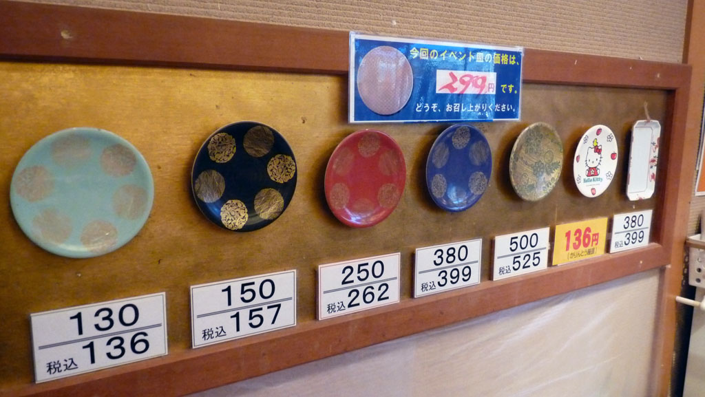 sushi restaurant chiba